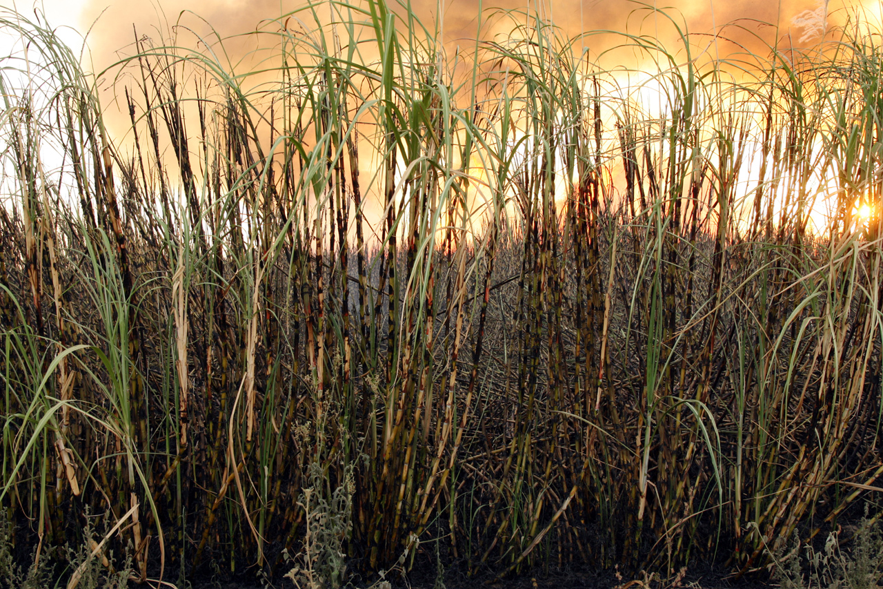 Compagnie sucrière du Sénégal, brulage des champs de canne à sucre